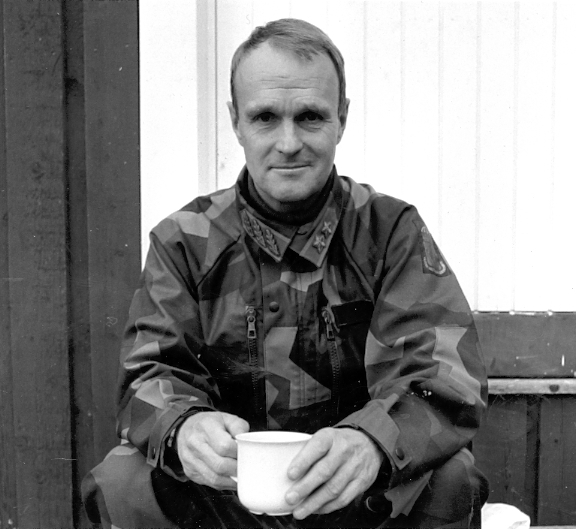 Militärbefälhavare Bertel Österdahl nov. 1990.